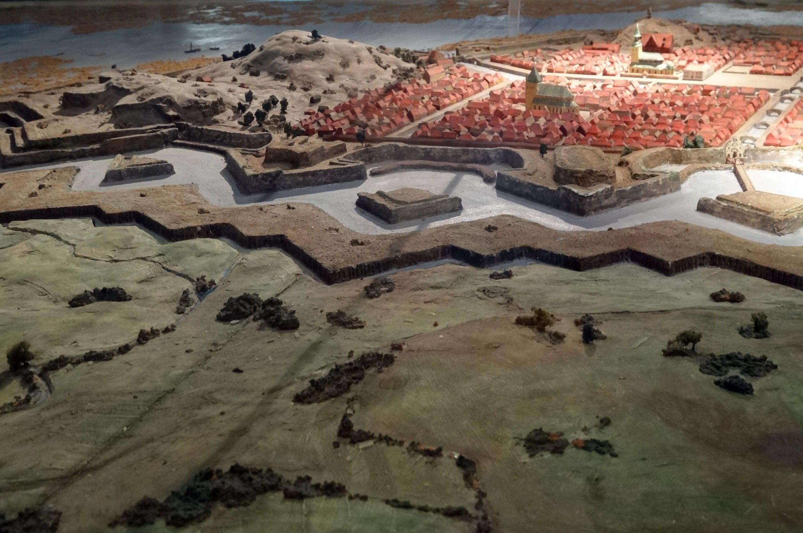 Centrala Göteborg under tidigt 1700-tal sett från söder. Modell på Göteborgs Stadsmuseum.